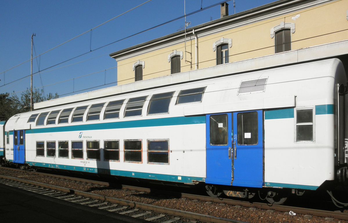 Carrozza a due piani nella stazione di Milano Greco Pirelli, in composizione a un treno della linea S8